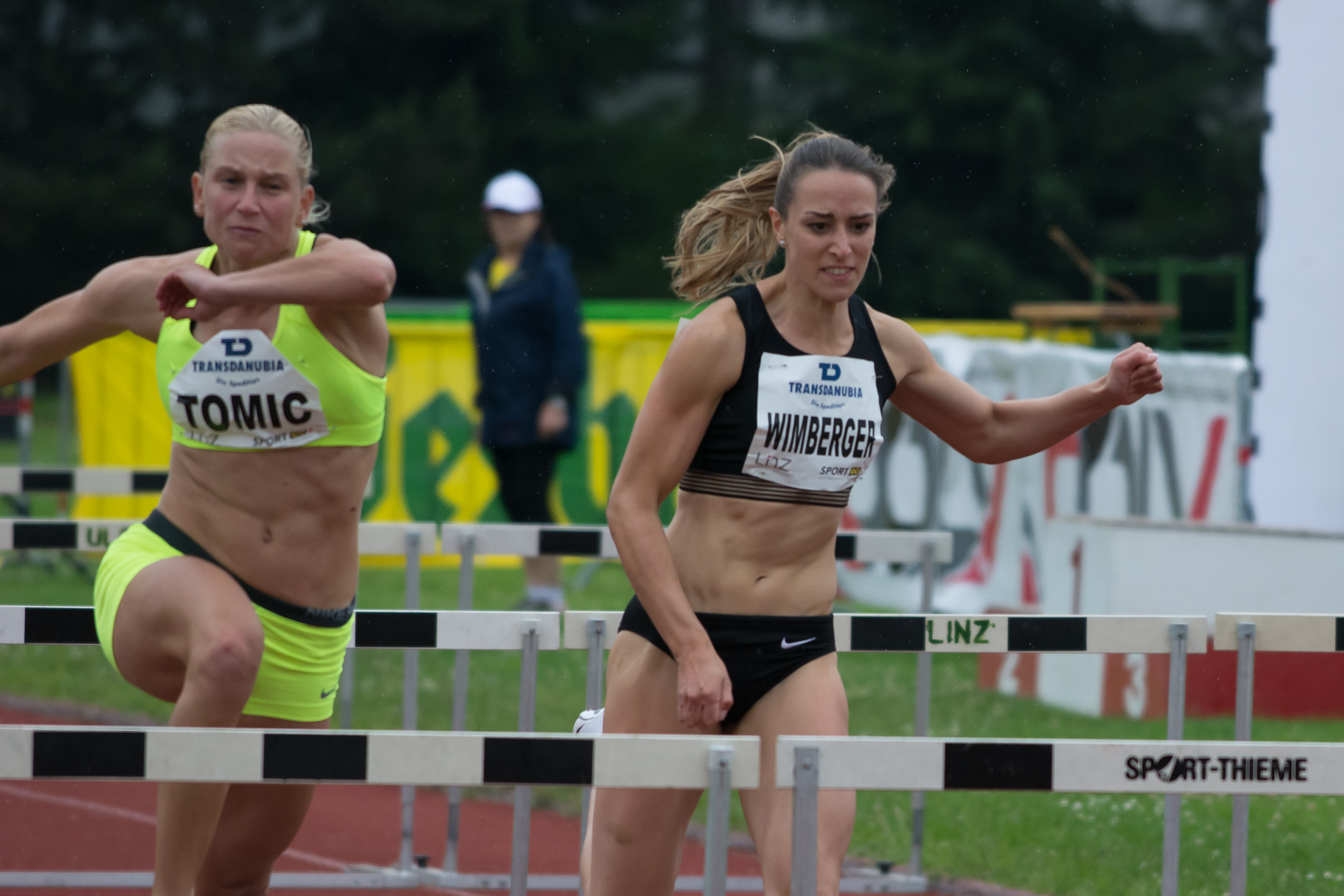 Top Meetings Austria 2016: Linzer Leichtathletik-Gala - Linz / Sportunion Landeszentrum, 11.06.2016 / 100 m Hürden Frauen Vorlauf / Tomic, Wimberger